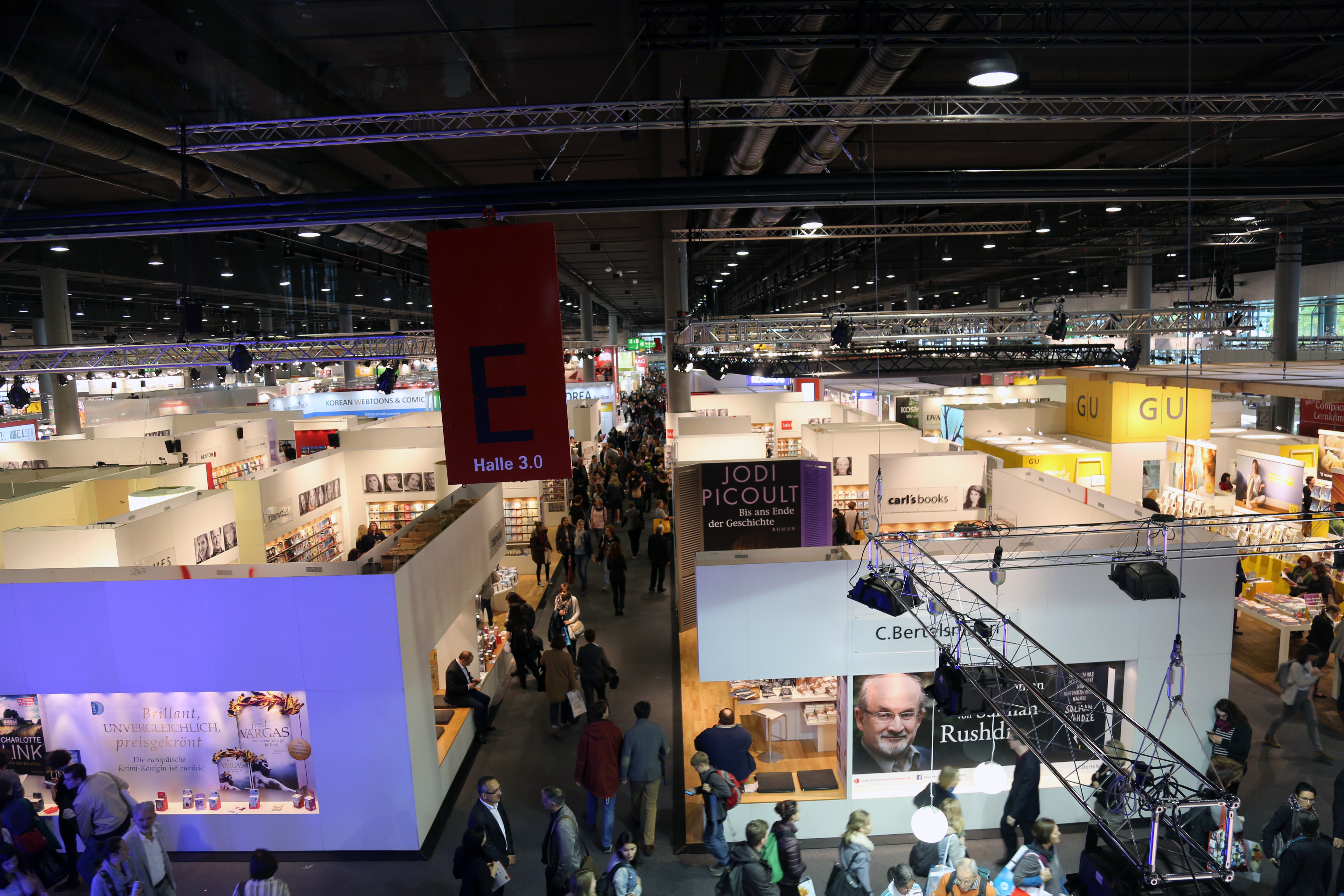 Überblick über eine Halle der Frankfurter Buchmesse 2015